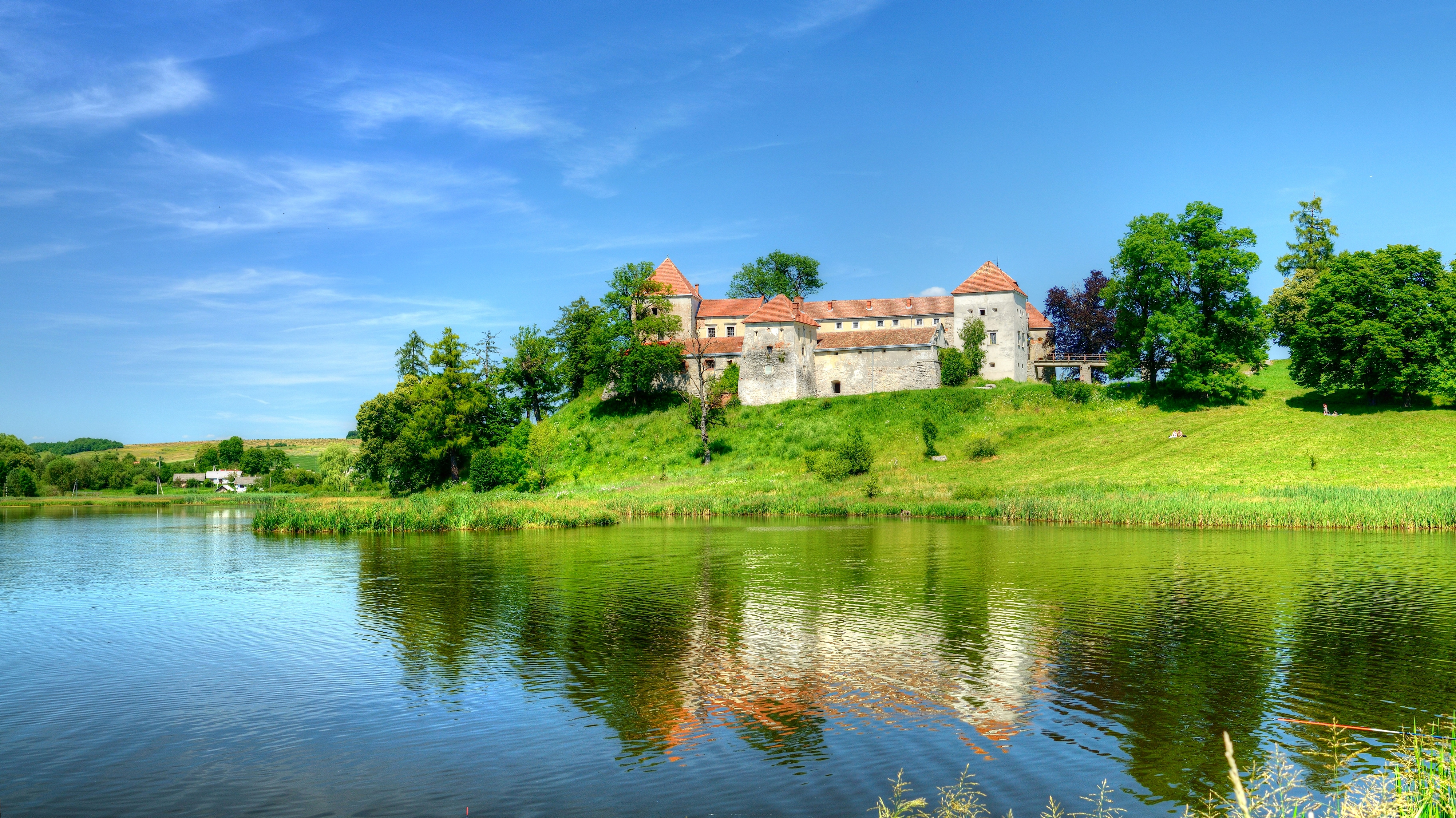 вид на замок з дороги